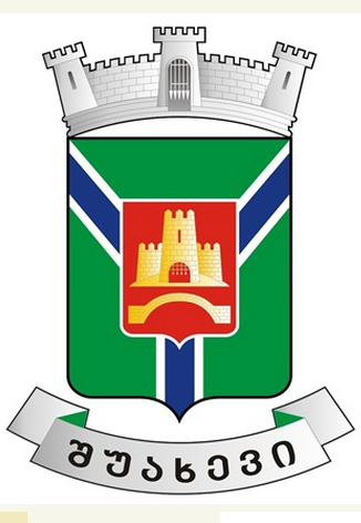 შუახევის მუნიციპალიტეტის გერბი